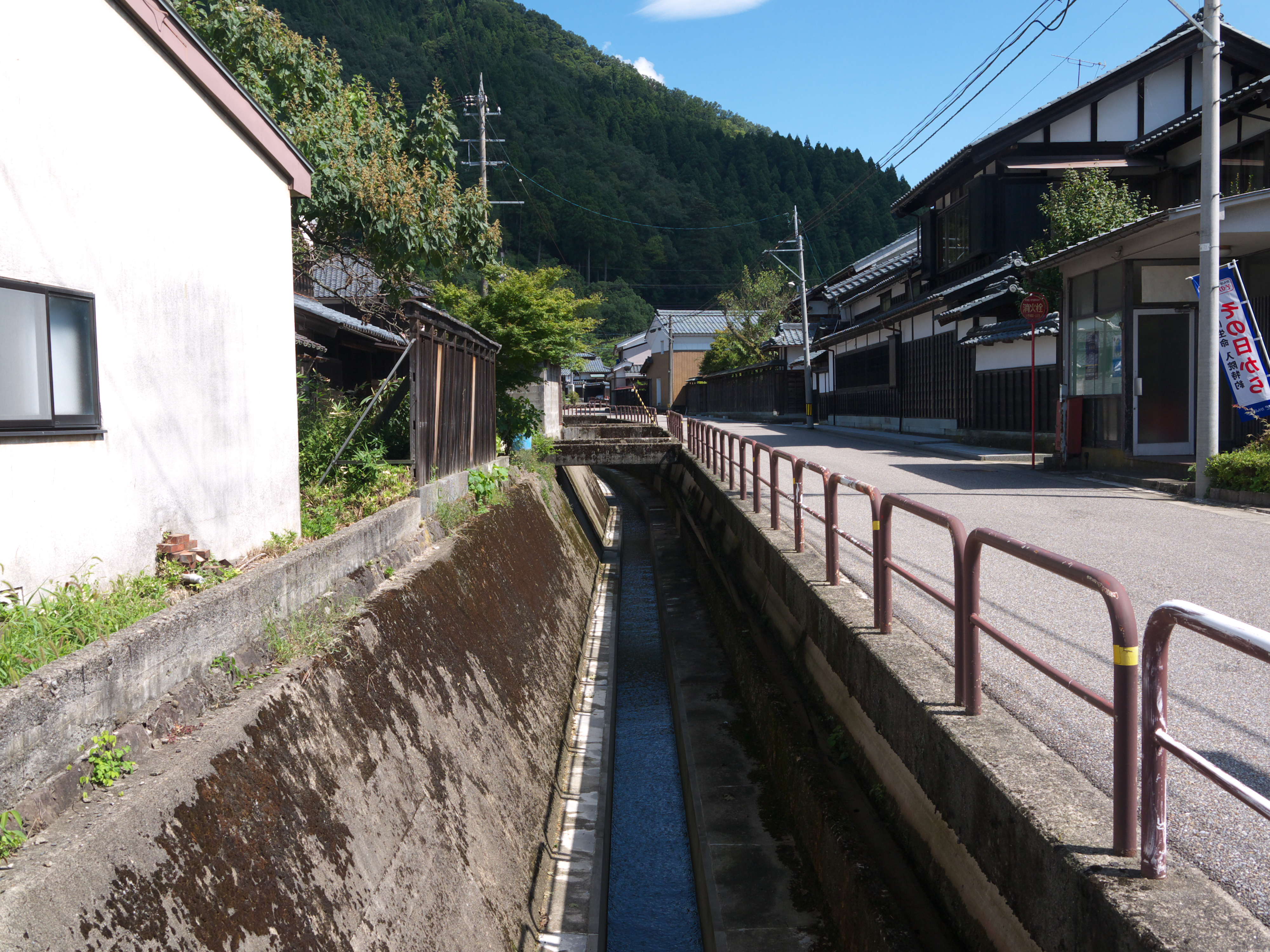 越前和紙の里紙すきの郷